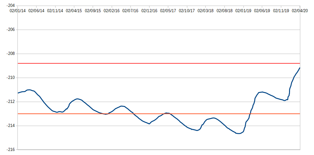 Niveau du lac de Tibériade/mer de Galilée/lac de Kinneret/lac de Genezareth mesuré par et archivé sur et archive.is. Autre source de données : archivé sur . Autre source de données : ; pour l'utiliser : cliquer sur le champ de date à gauche, puis sur le bouton encadré pour générer. Le graphe est généré par LibreOffice Calc. Les données brutes sont stockées sur une sous-page de ma page utilisateur : ici.